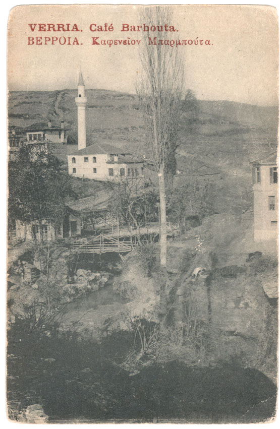 Кафе Барбута в Бер